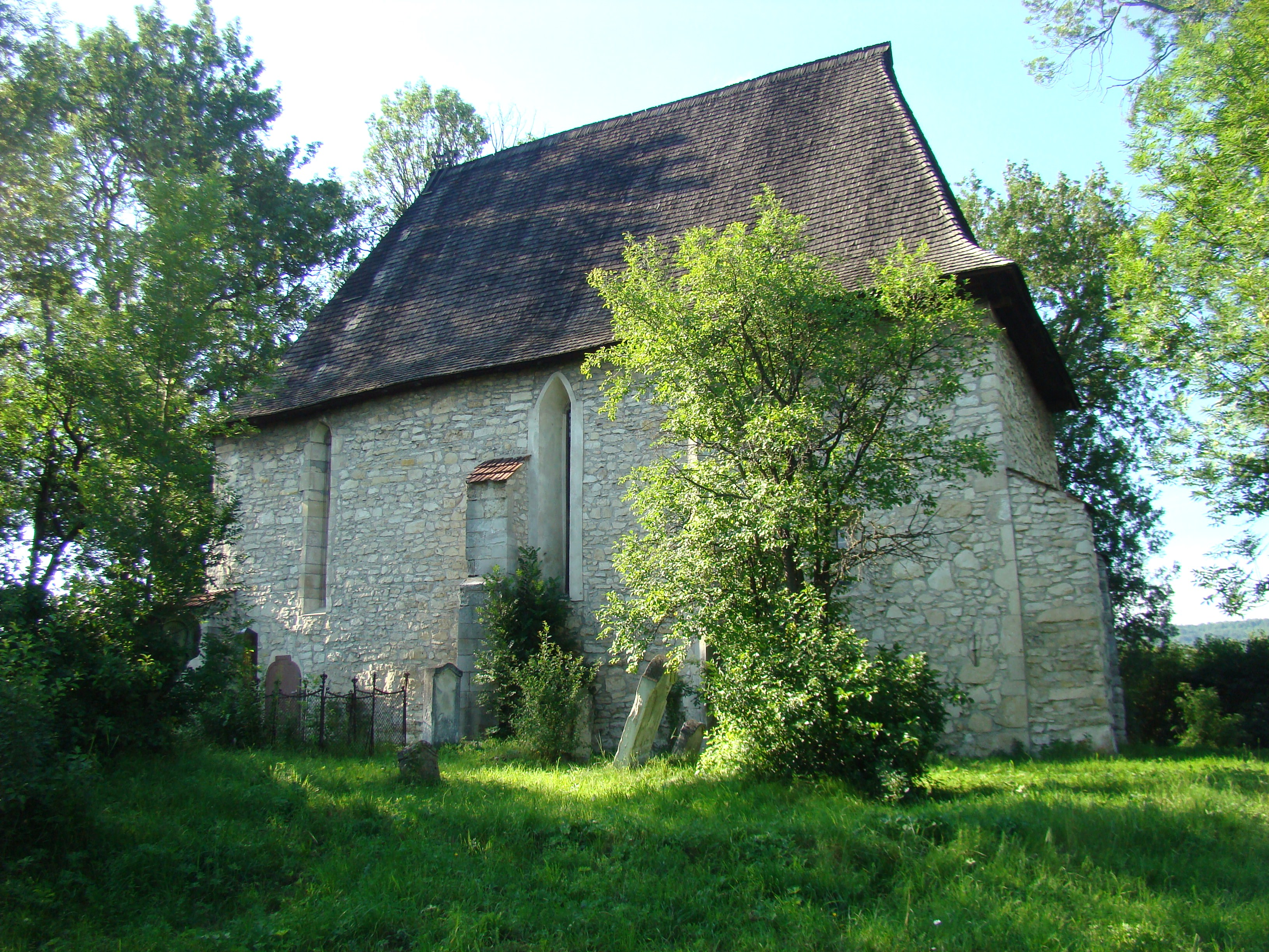 Biserica reformată, sat DOROLŢU; comuna AGHIREŞU, Cluj 01